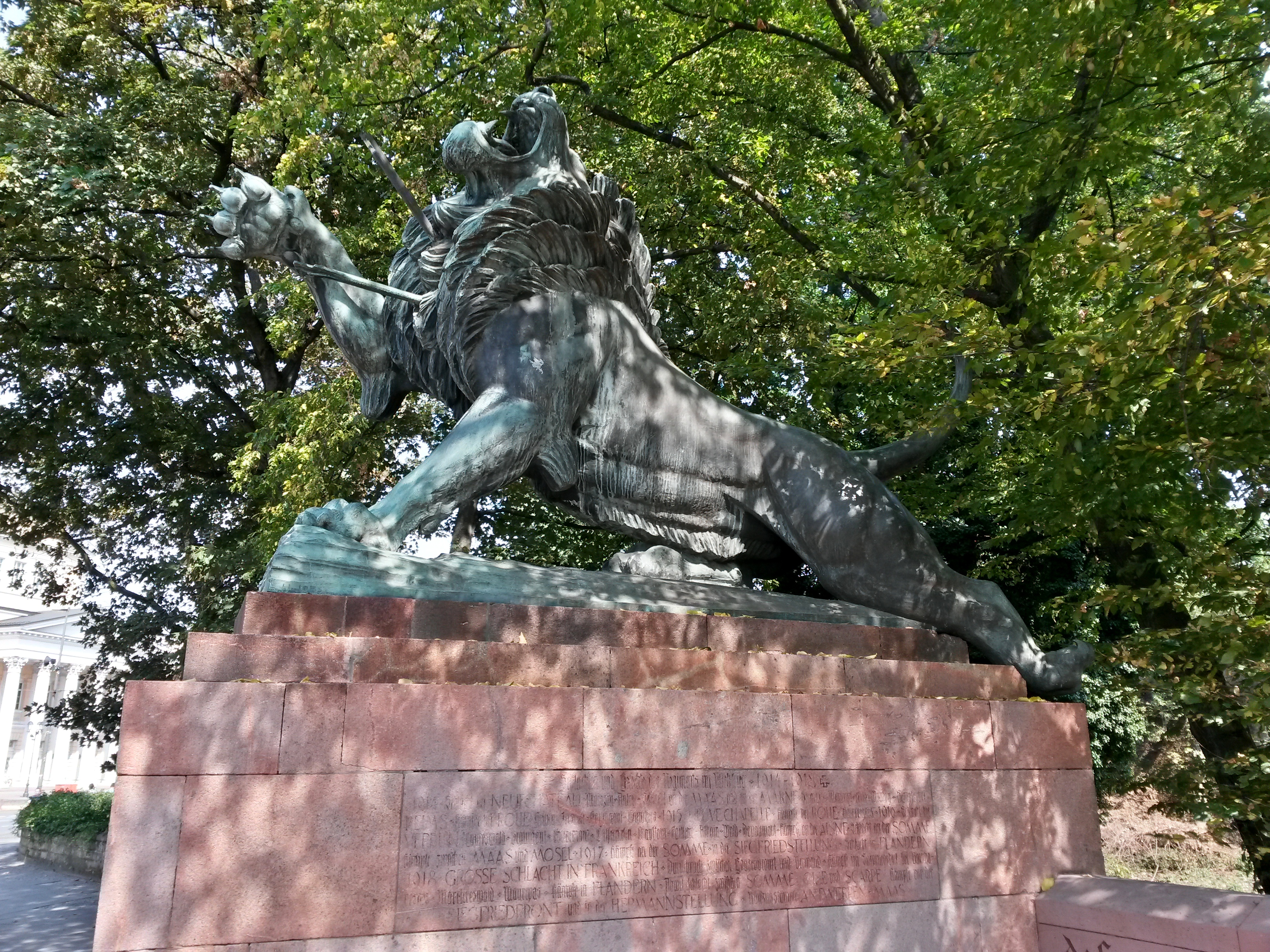 Leibgardistendenkmal in Darmstadt, Friedensplatzː Der Sandsteinsockel des in eine Nische vor der nördlichen Schloßmauer eingefügten Denkmals verjüngt sich nach oben und trägt einen tödlich verwundeten Löwen, der sich mit letzter Kraft aufbäumt. Den Bronze-Löwen gestaltete 1928 Heinrich Jobst. Das Denkmal wurde zu Ehren der Gefallenen und Vermissten des Leibgarde-Infanterie-Regiment (1. Großherzoglich Hessisches) Nr. 115 aufgestellt. Der Sockel zeigt Ausschnitte aus dem Gefechtskalender des Regiments.